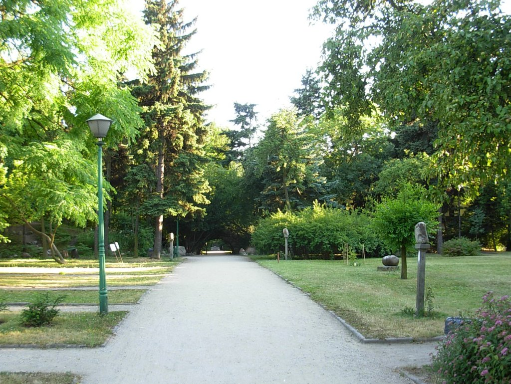 Arboretum w Bydgoszczy